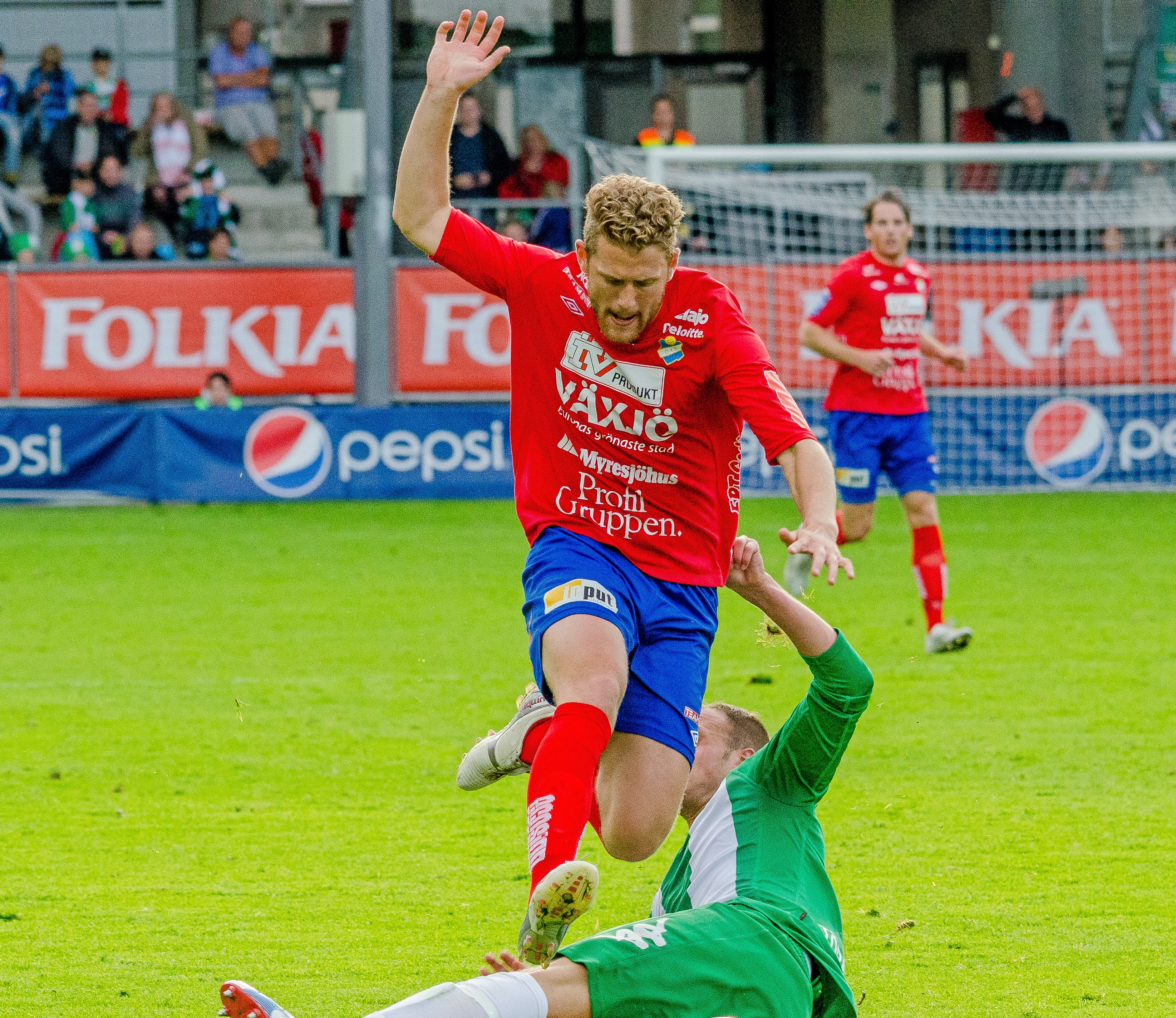 Östers högerback Stefan Karlsson undviker en tackling i 0-2 segern mot Hammarby på Söderstadion 24/6 2012.